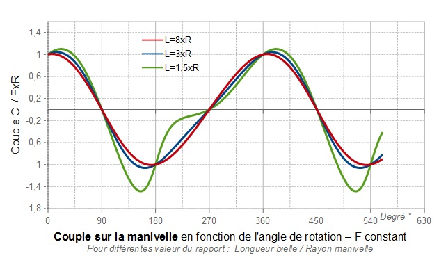 Système Bielle-manivelle - Représentation du couple de la manivelle en fonction de l'angle de rotation de la manivelle. Force piston constant